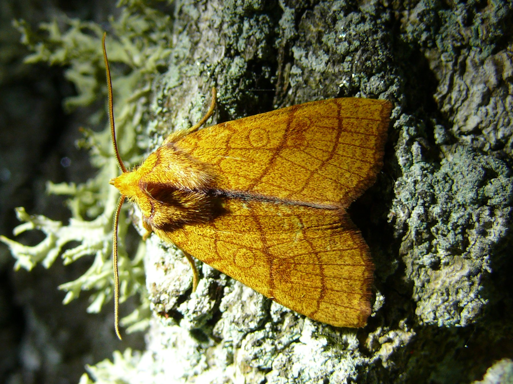 Xanthia citrago